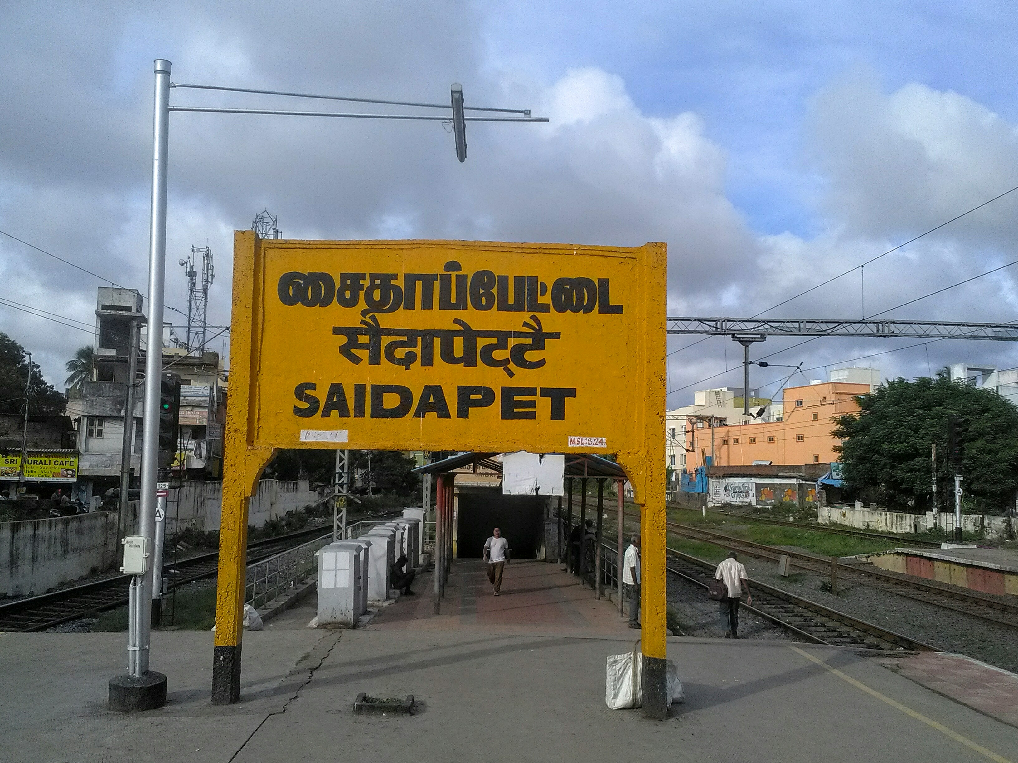 சைதாப்பேட்டை இரயில் நிலையத்தில் எடுக்கப்பட்ட புகைப்படம்.